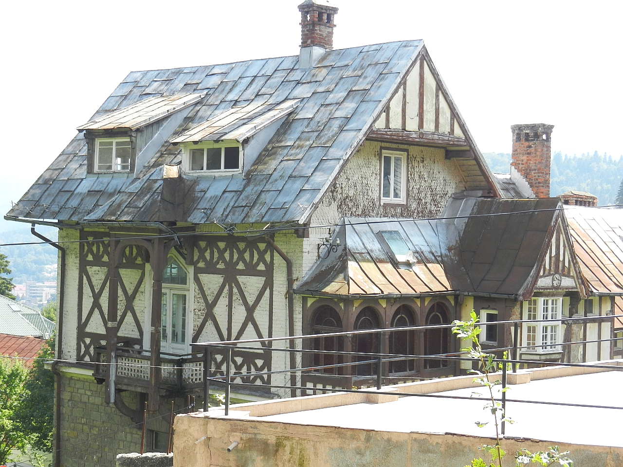 Vila Take Ionescu